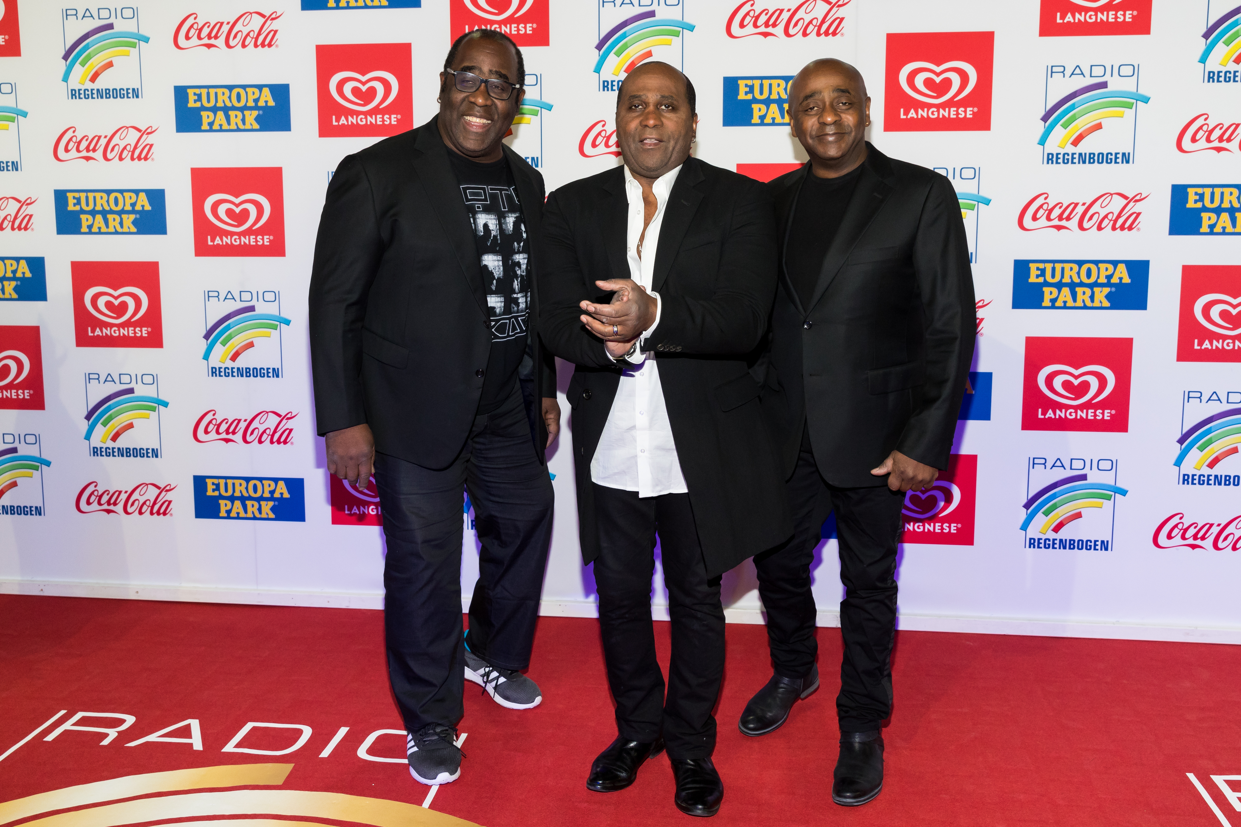 during Radio Regenbogen Award 2018 at Europapark, Rust, Baden-Württemberg, Germany on 2018-03-23, Photo: Sven Mandel